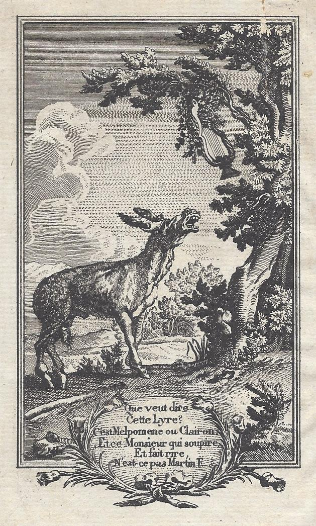 Darstellung des Martin F. (Èlie Catherine Fréron) als Esel. Frontispiz zu Voltaires Tancrède, 1761 ( Ausgabe Bassompierre Lüttich zugeschrieben X-98 S.) Nach Bengesco und BNF war Gravelot der Zeichner/Stecher der Darstellung .